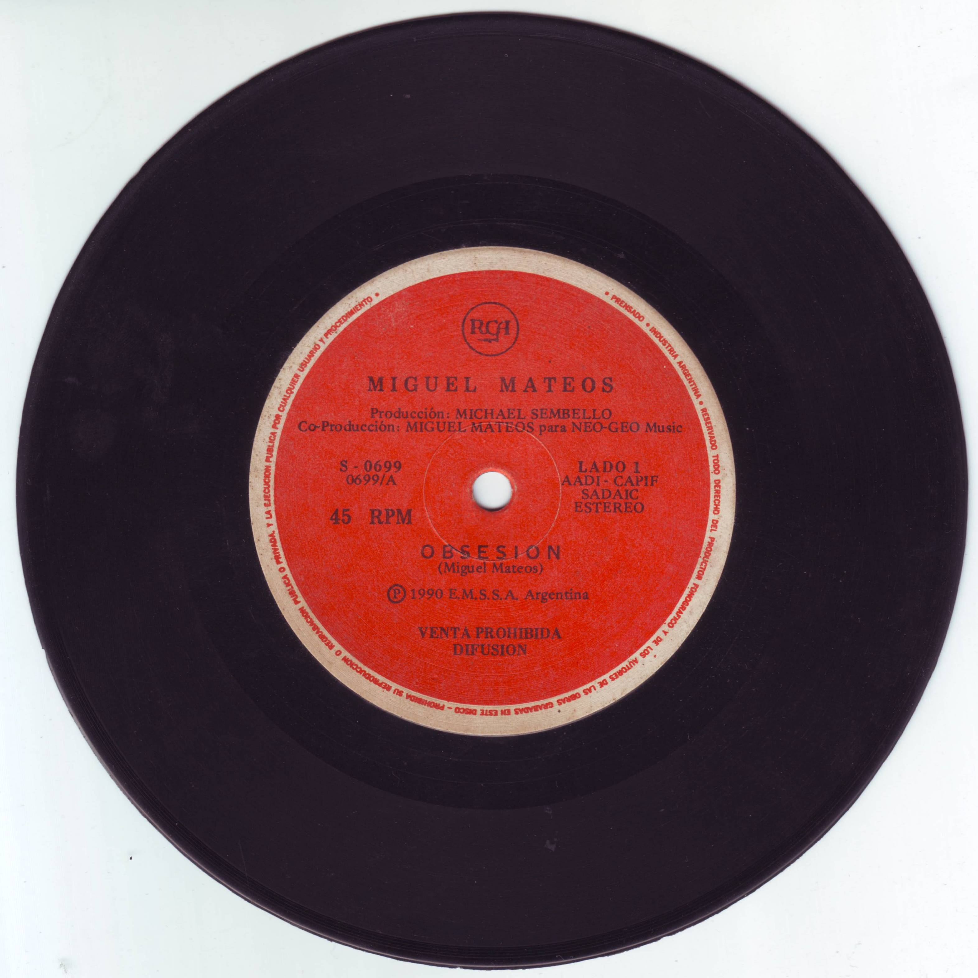 Disco de vinilo simple "Obsesión" de Miguel Mateos.